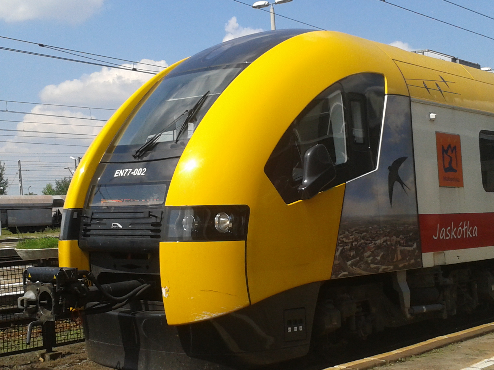 PESA Acatus II 32WE EN77-002 Jaskółka